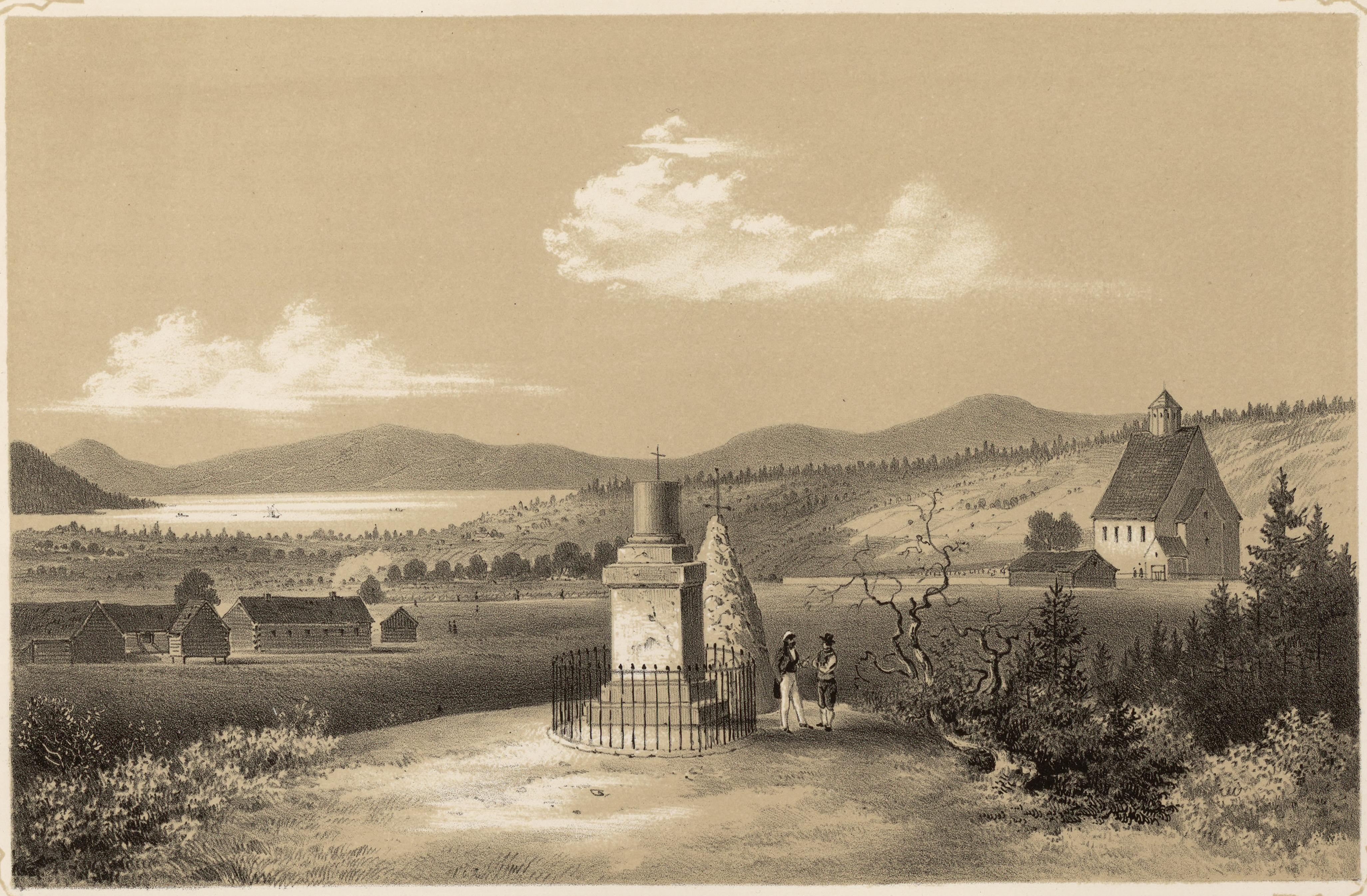 "Stiklestad, med Olaf den Helliges Mindestötte". Illustrasjon hentet fra boken "Norge fremstillet i Tegninger" av Asbjørnsen, P.Chr. og utgitt av Chr. Tønsberg (no, 1848)